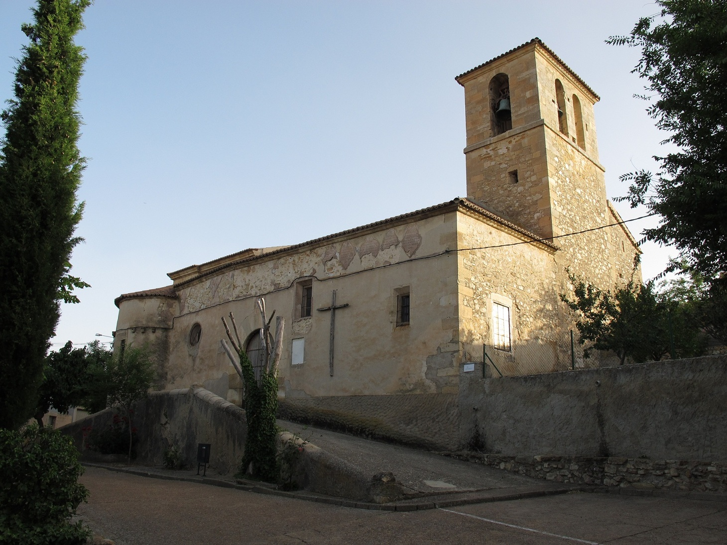 Iglesia de Fuentelsaz (Guadalajara)